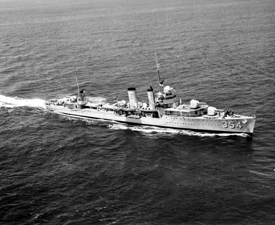 USS Monaghan (DD-354).